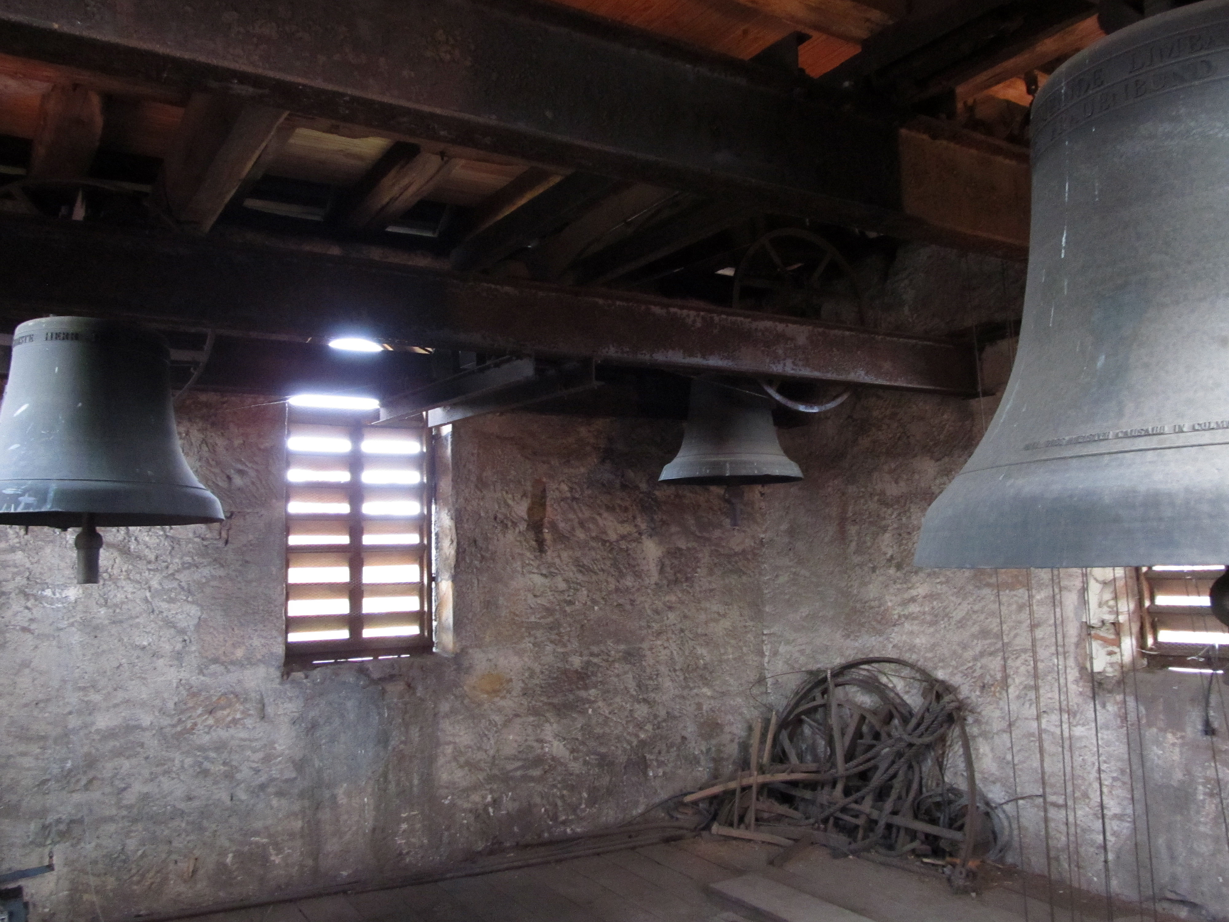 Glocken der protestantischen Elisabethkirche in Limbach, Gemeinde Kirkel, Saarland